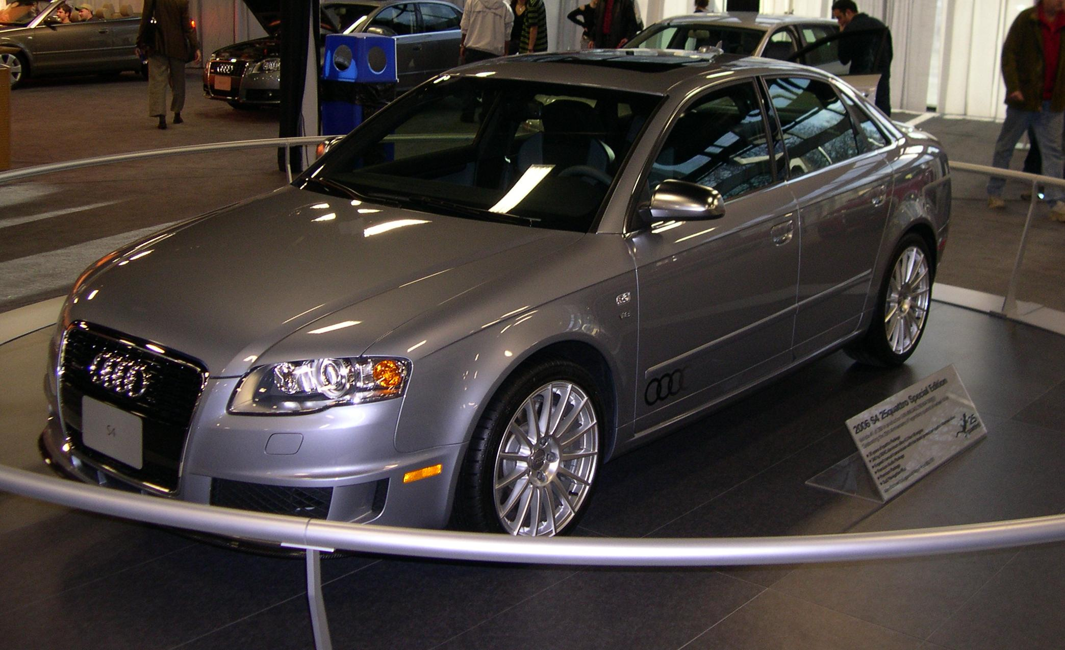 2006 Audi B7 S4 "25quattro" special edition